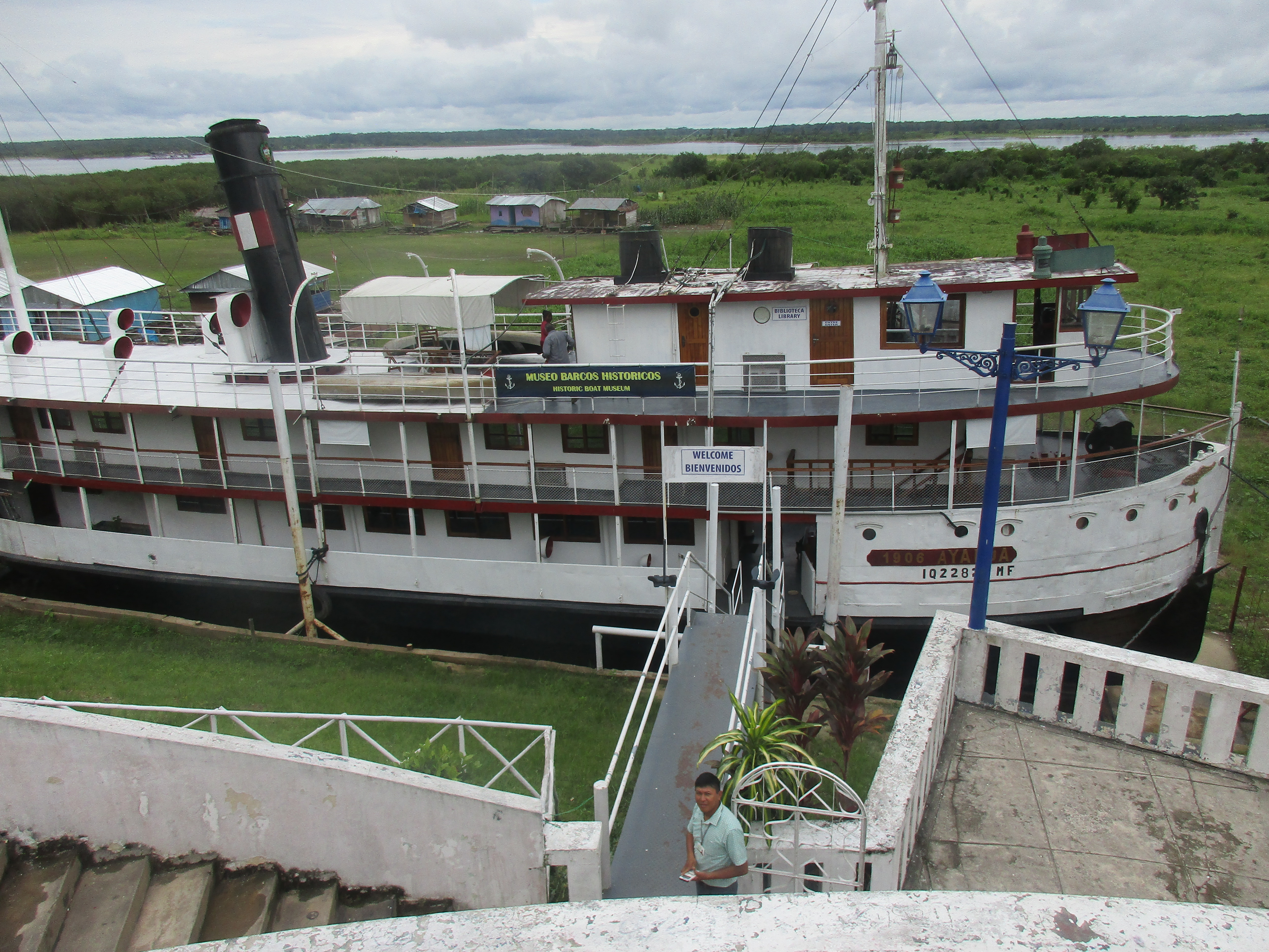 Barco Museo Histórico Ayapua en Iquitos